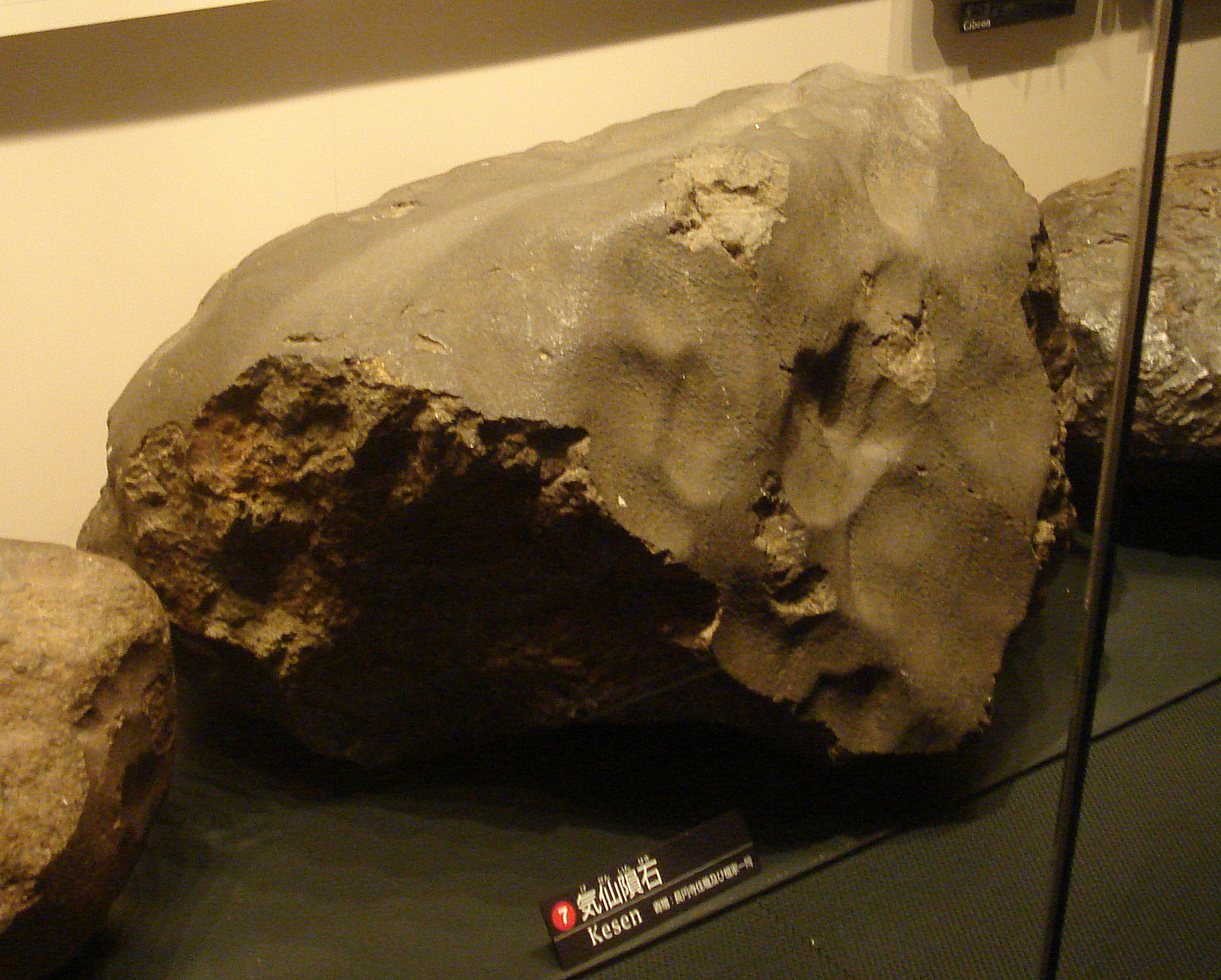 Kesen meteorite, main mass